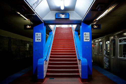 Station division sur la bleue